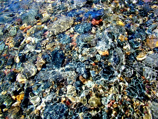 У берега Телецкого озера в хорошую погоду. Лето 2010 года.